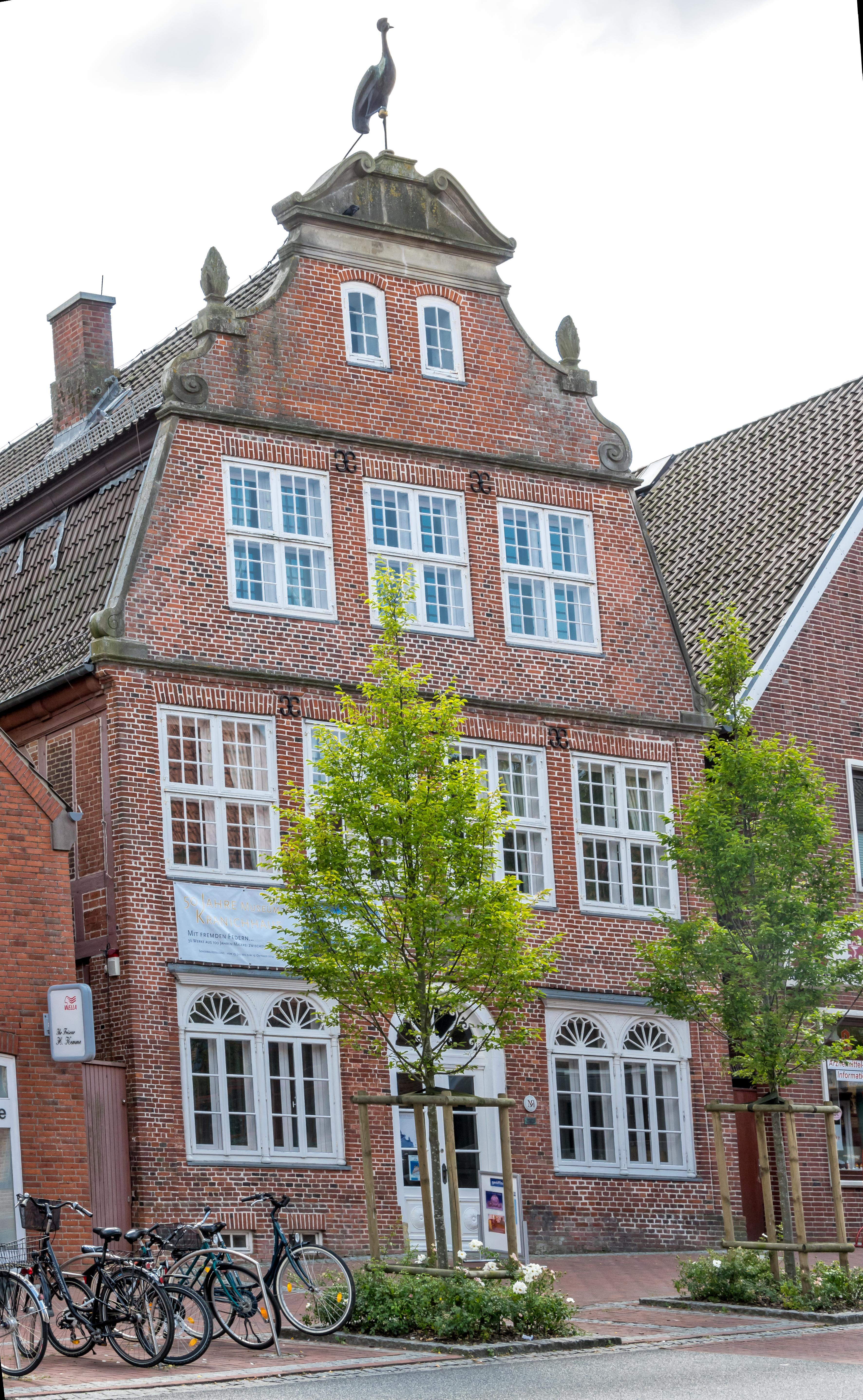 Bilder aus Otterndorf Denkmalgeschützte Gebäude Das Kranichhaus